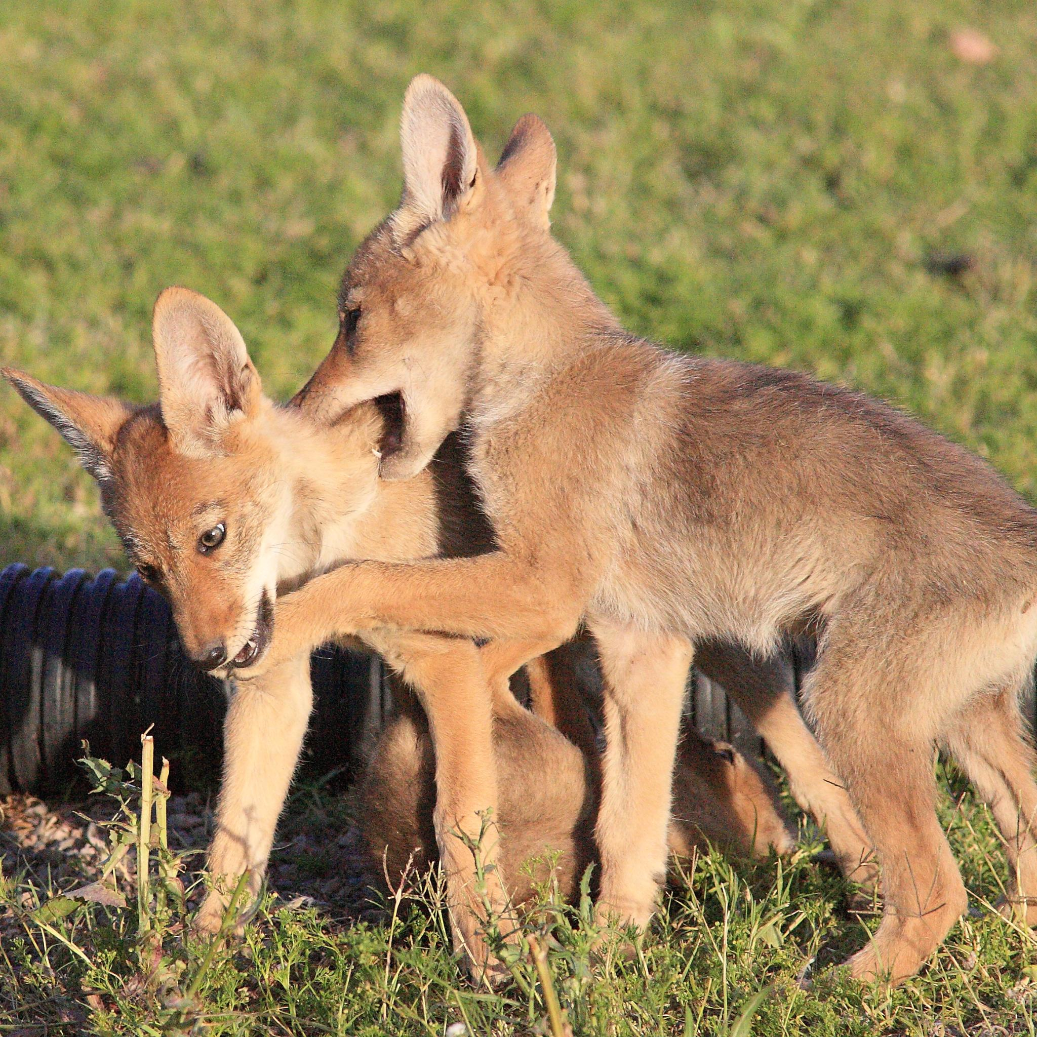 Coyote pups, Mesa, AZ.